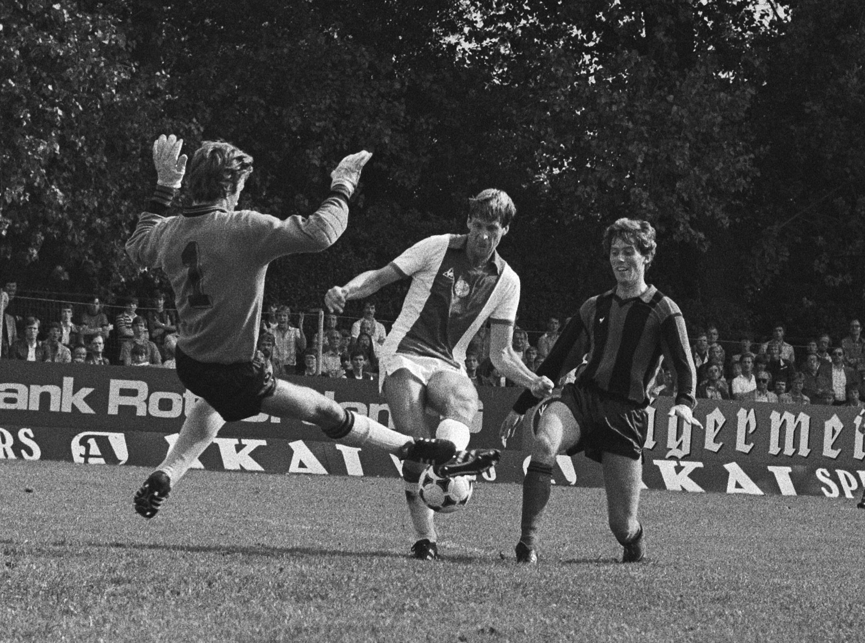 Excelsior tegen Ajax: Kees Zwamborn scoort langs Excelsior-doelman Vermunt